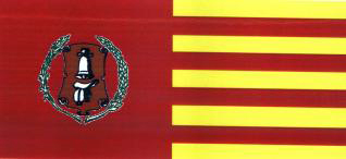 Bandera de Sencelles